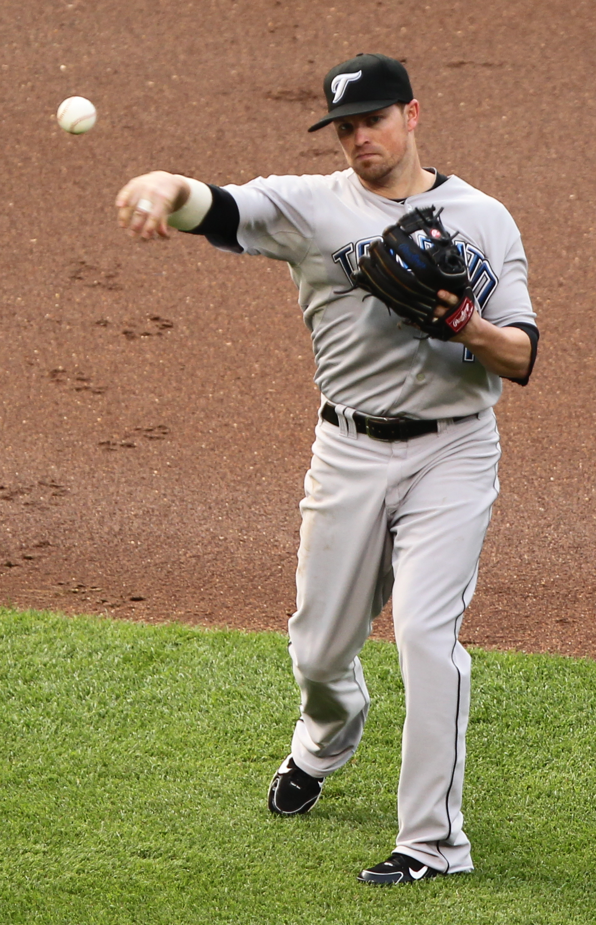 Mike McCoy